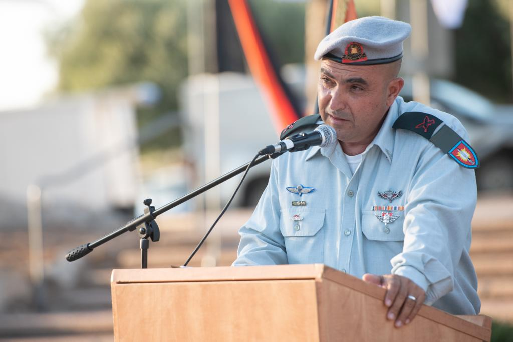 תא"ל עידו מזרחי נכנס אתמול (שלישי) לתפקידו כקצין חיל הנדסה קרבית ראשי. הטקס נערך במתכונת מצומצמת באנדרטת חיל ההנדסה, במעמד מפקד זרוע היבשה, אלוף יואל סטריק, מפקדים ובני משפחה. תא"ל עידו מזרחי מחליף בתפקידו את תא"ל אילן סבג, אשר כיהן בתפקיד במהלך שלוש השנים האחרונות.